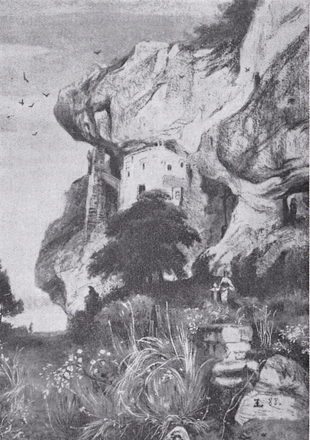 Isteiner Klotz mit St.-Veits-Kapelle